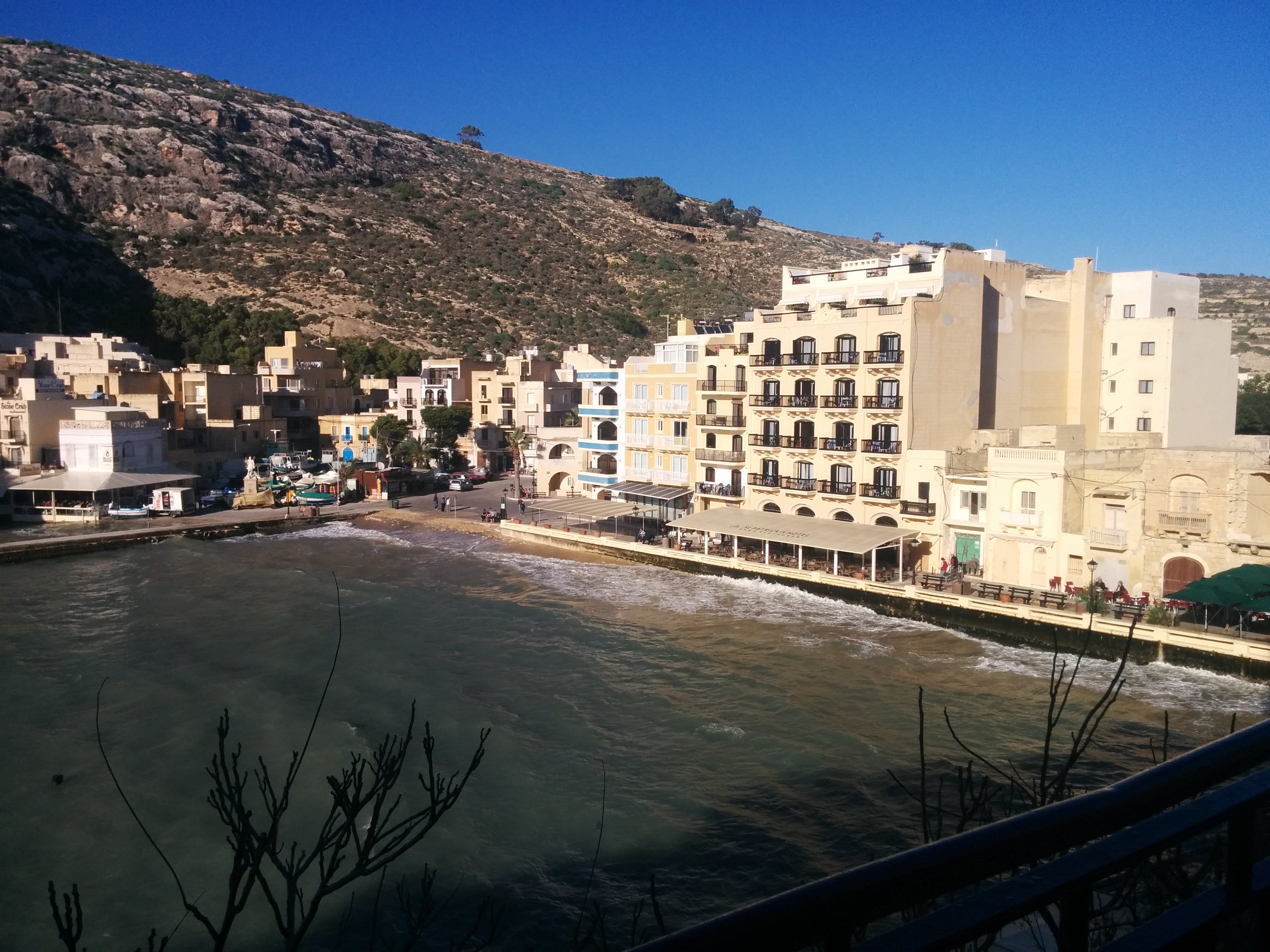 Solig dag i Xlendi Bay